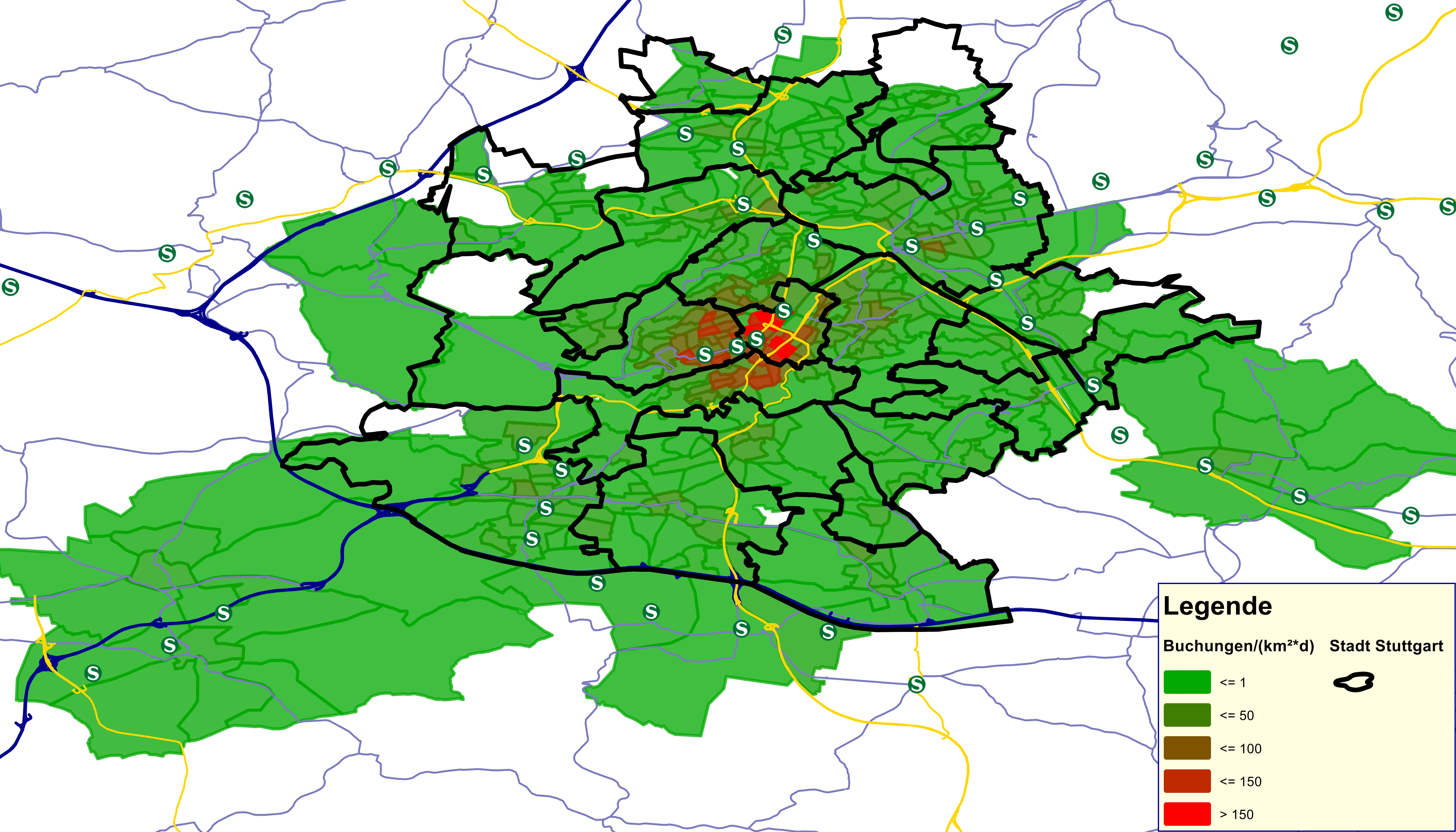 Grafik beschreibt die durchschnittliche Car2go-Nutzung in Stuttgart pro Tag und km², basierend auf eigenen Forschungen